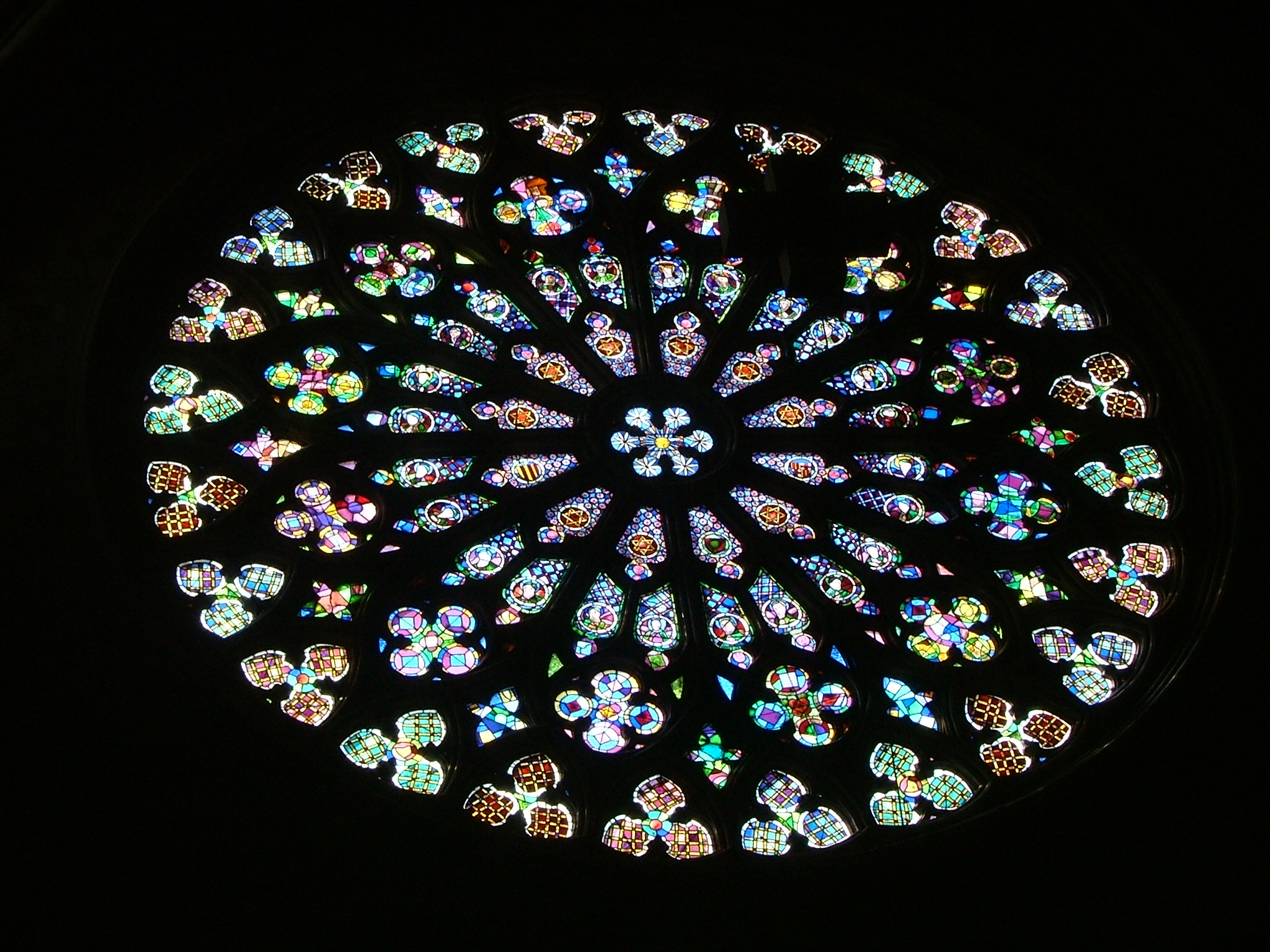 Rosone di Santa Marìa del Pì, Barcelona